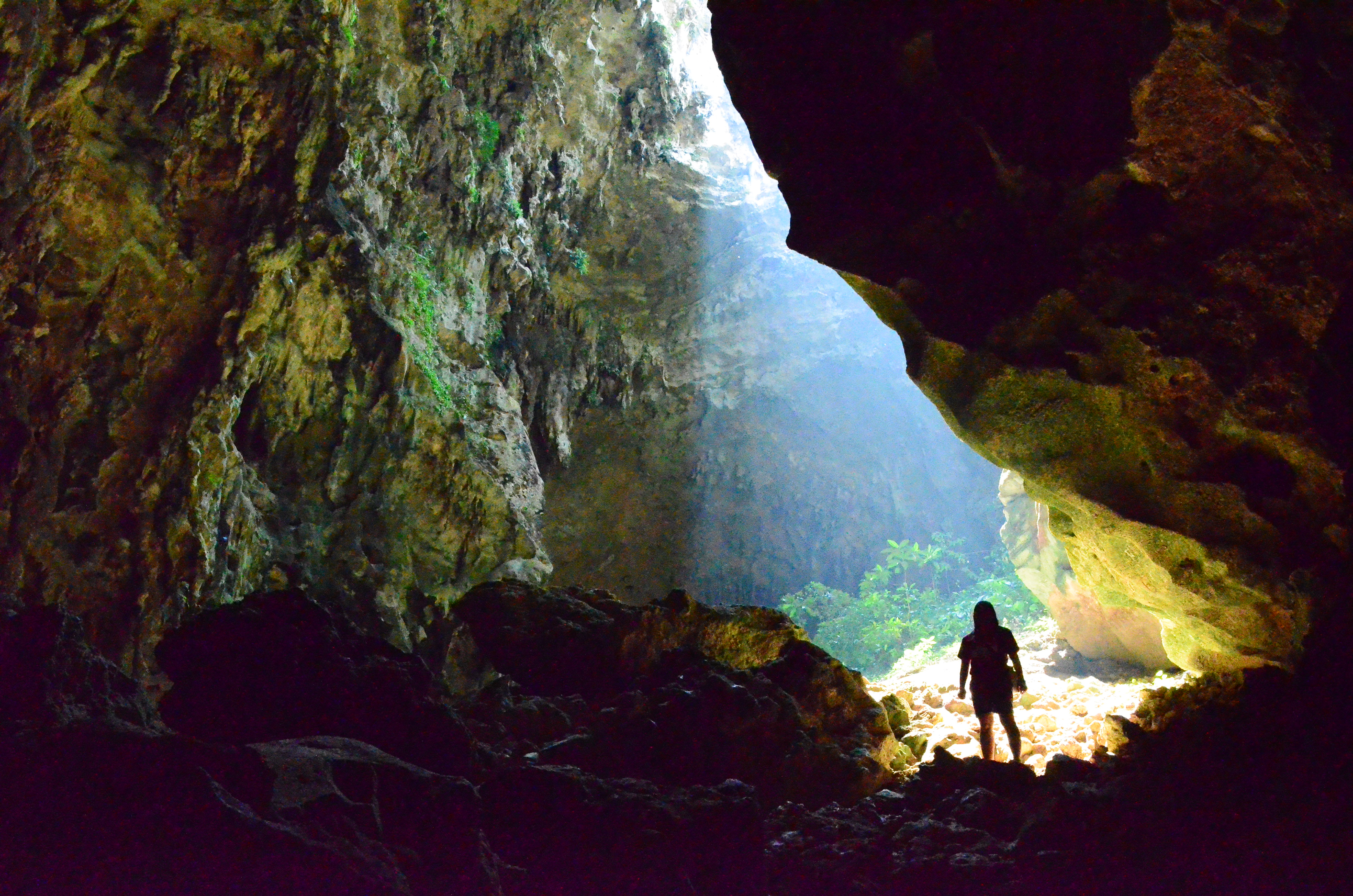 Callao Cave